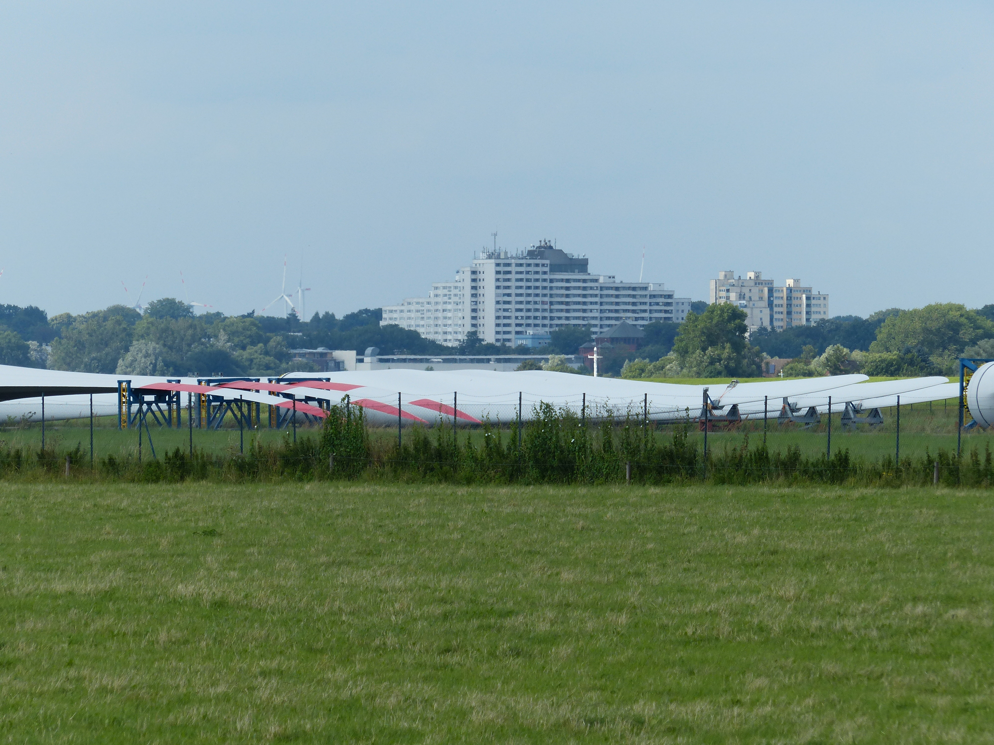 Lagernde Rotorblätter für Windräder auf dem ehemaligen Flugplatz Lemwerder; im Hintergrund das Bremer Wohnhochhaus Grohner Düne